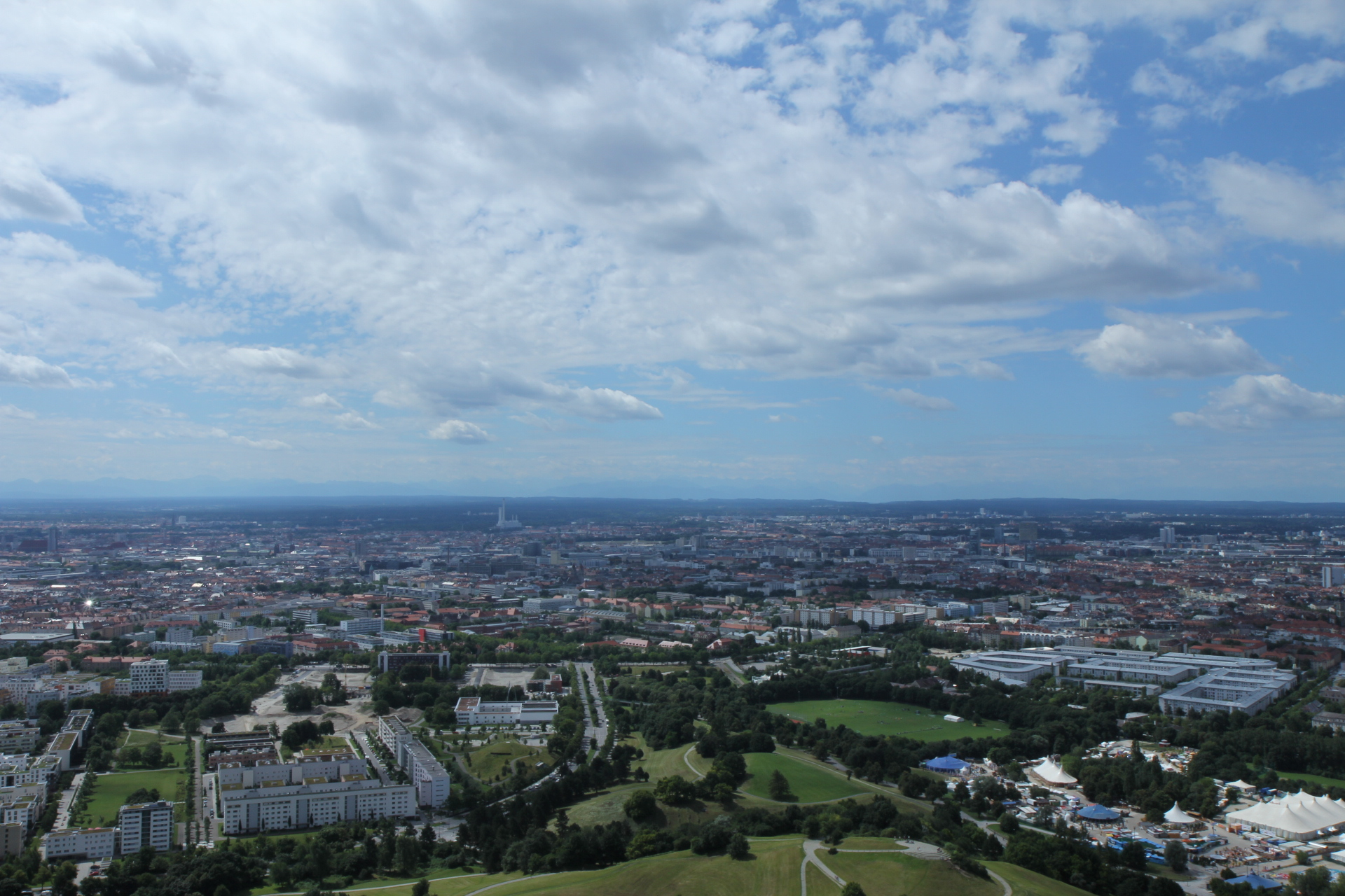 Wikipedia im Landtag – Bayern 17. bis 19. Juli 2012 in München Dieses Foto wurde im Rahmen des Projektes „Wikipedia im Landtag“ erstellt.